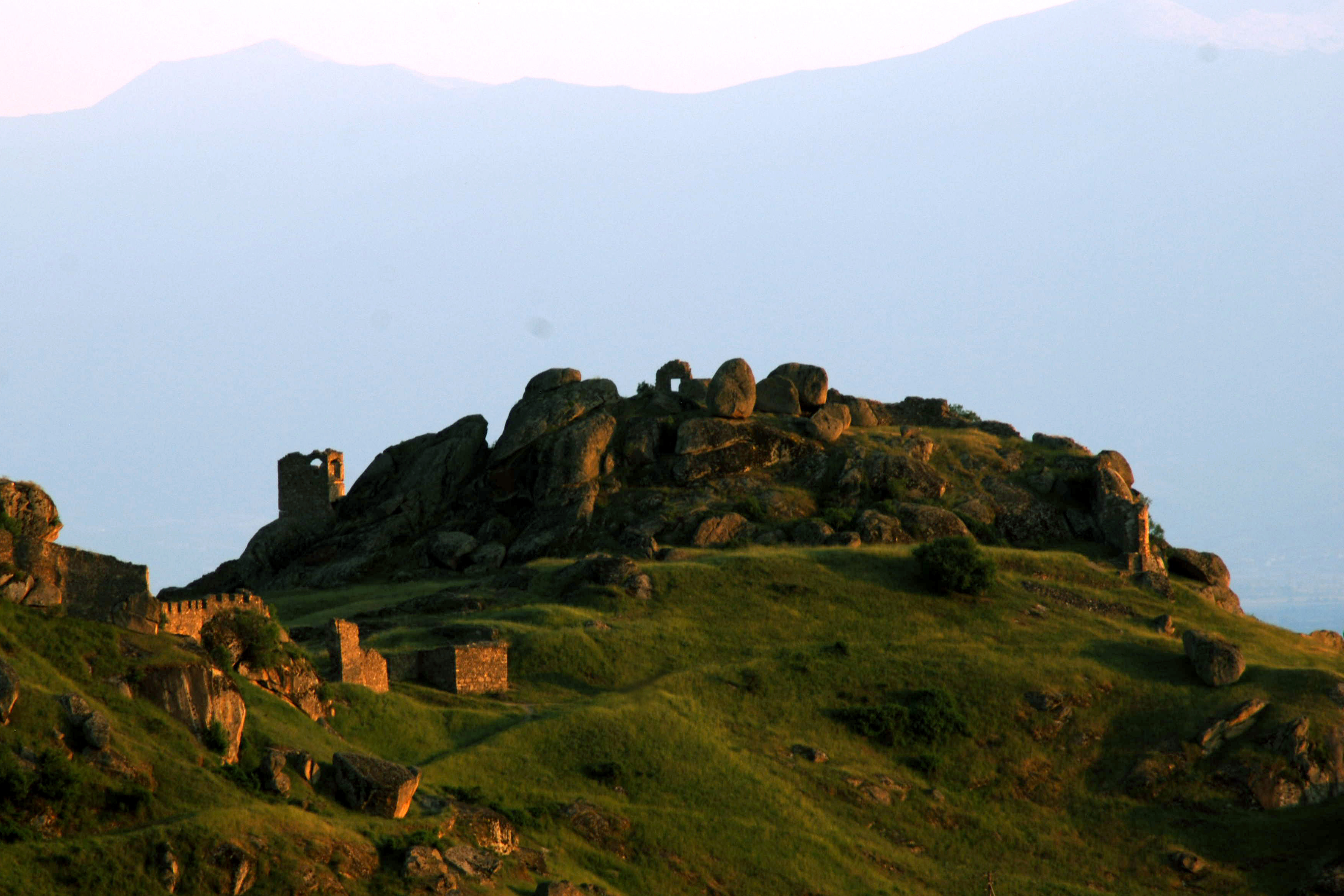 Маркови кули - Прилеп, фотографирано од Зеленик.